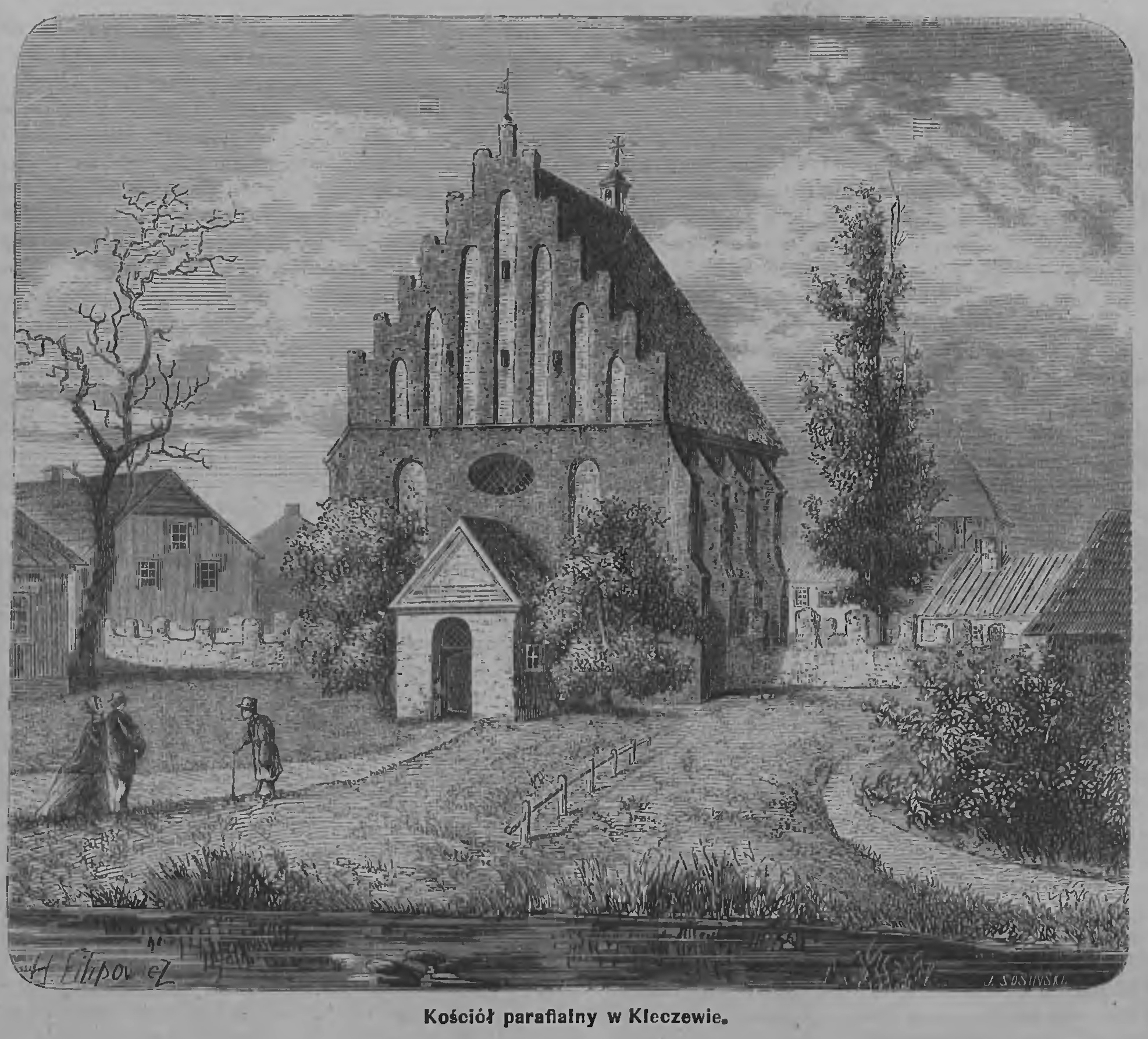 Kościół w Kleczewie - rycina z Tygodnika Ilustrowanego z 1870